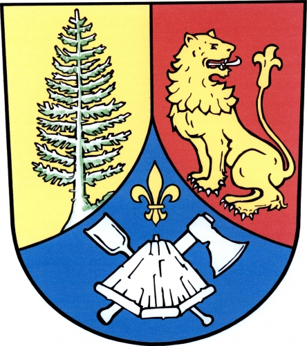 znak, Světnov, okres Žďár nad Sázavou